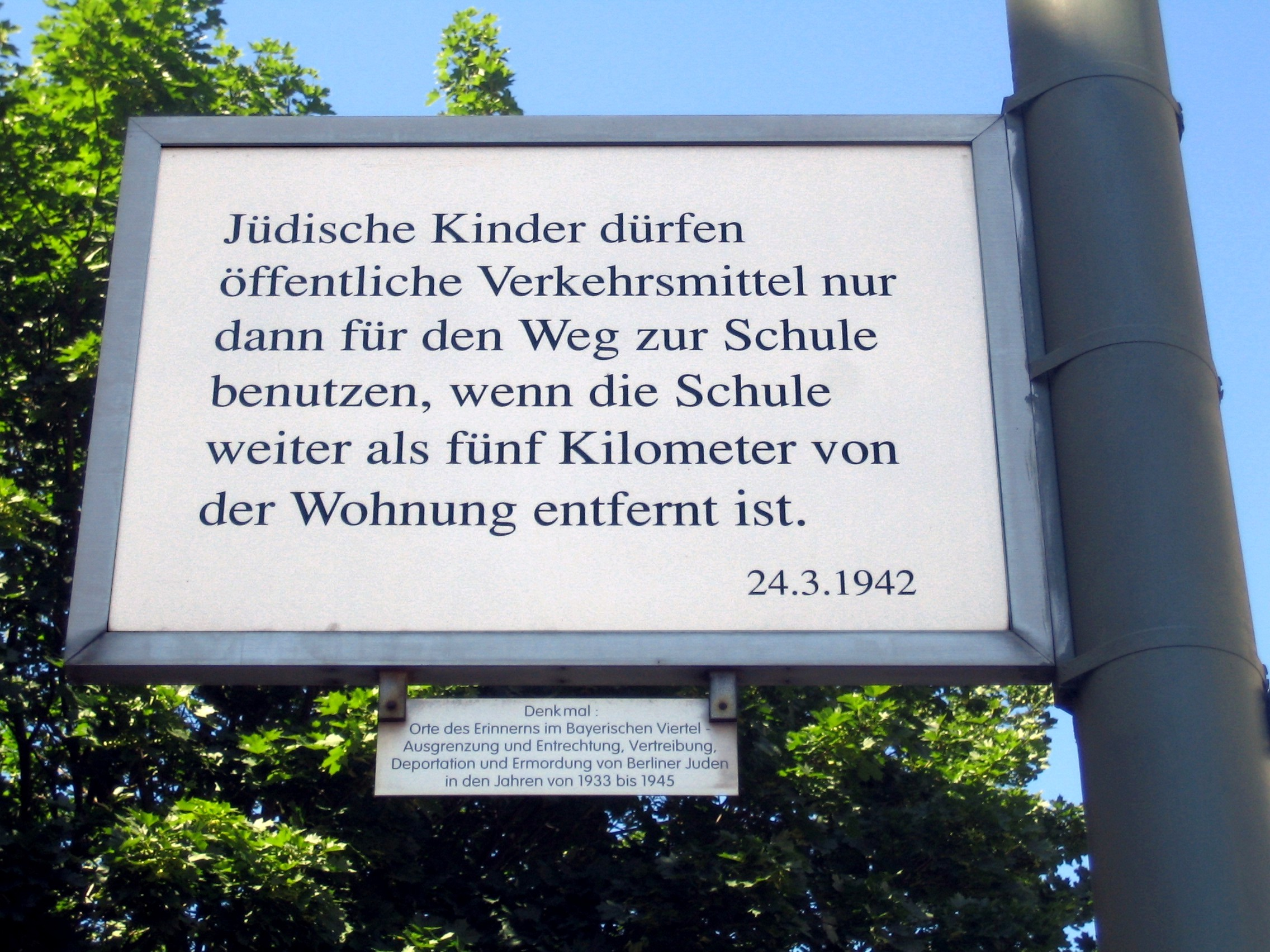 Berlin-Schöneberg, Bayerisches Viertel. Denkmal zur Erinnerung an die Unterdrückung der Juden 1933-1945. Tafel zum Verbot von öffentlichen Verkehrsmitteln für Schulkinder